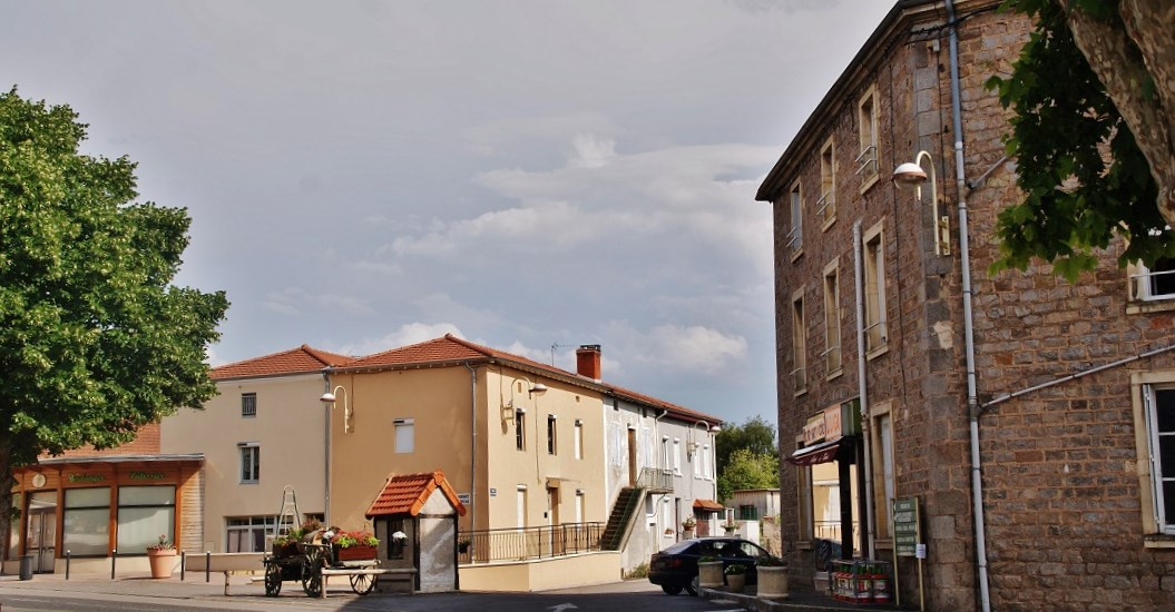 La Commune